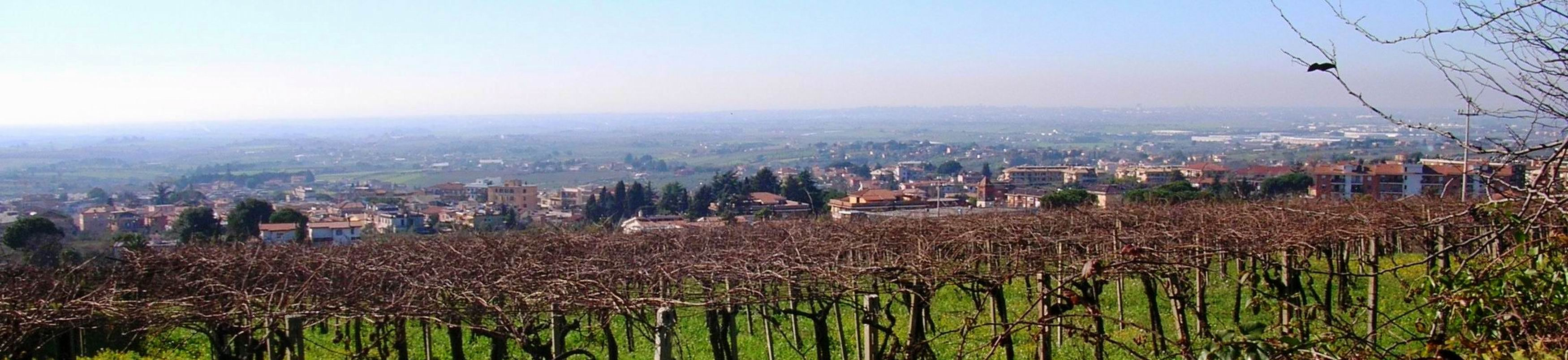 Cecchina panorama